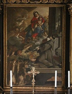 Comacchio, Oratorio del Suffragio delle anime purganti e di Sant'Antonio: interno, pala d'altare della Madonna del Suffragio e Sant'Antonio (di Padova). Opera derivata dall'originale File:Comacchio, chiesa del Suffragio (09).jpg